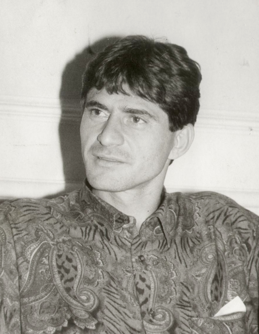 Ștefan Iovan